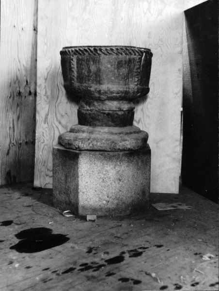 Dopfunt. Kategori: (04) DopfuntarDopfunt.